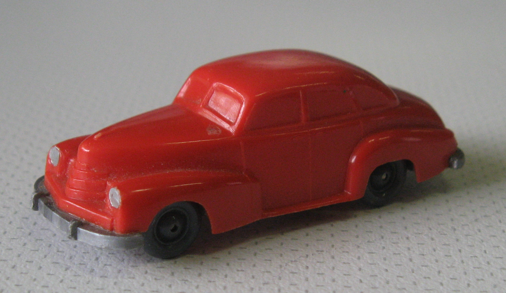 Wiking Modellauto